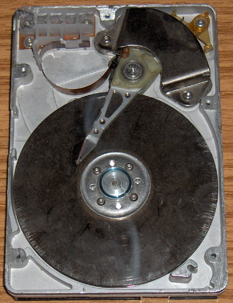 Disco duro Maxtor de 1GB abierto. Foto tomada por Jorge González. Disco duro